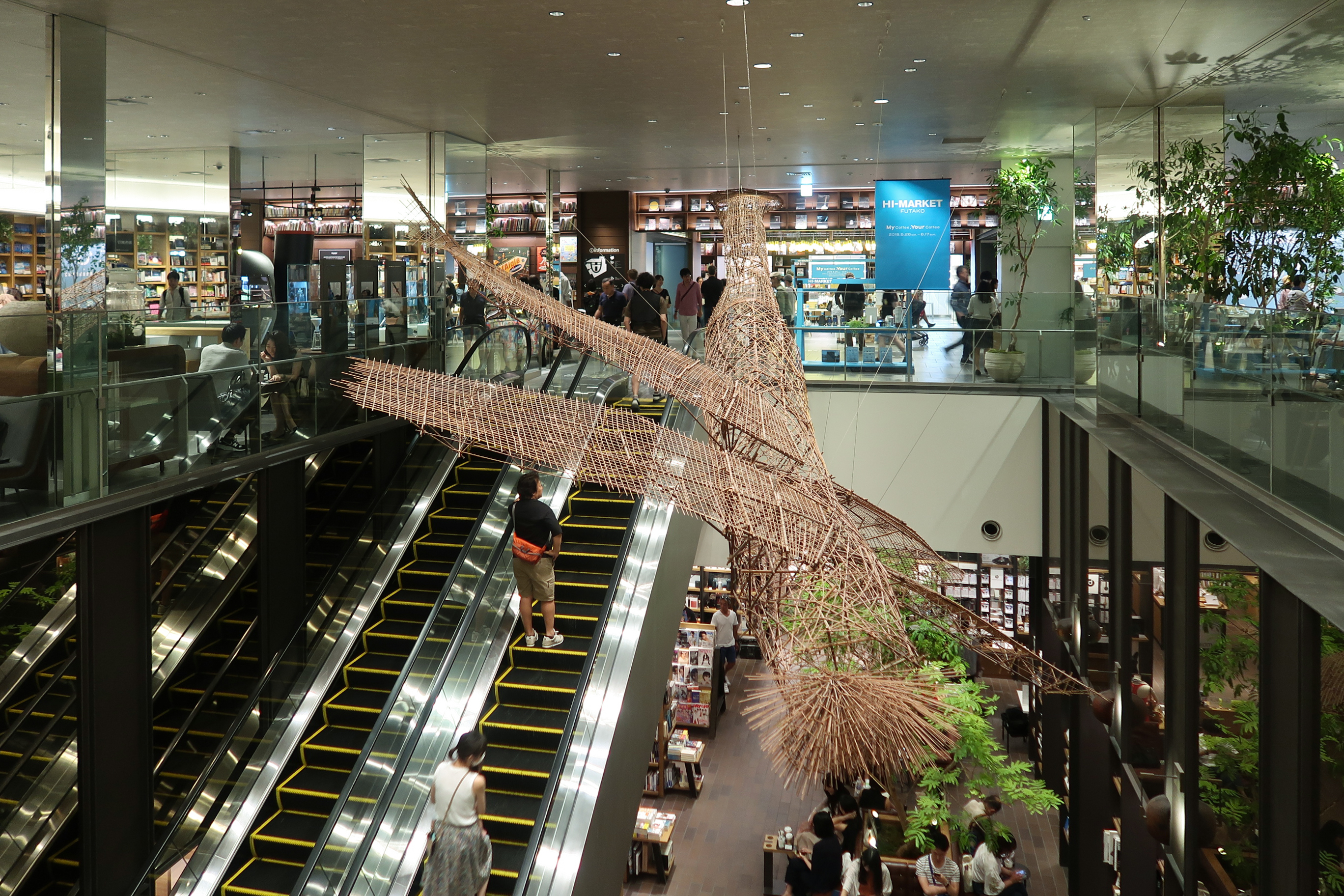 Futako Tamagawa TSUTAYA ELECTRICS 二子玉川蔦屋家電